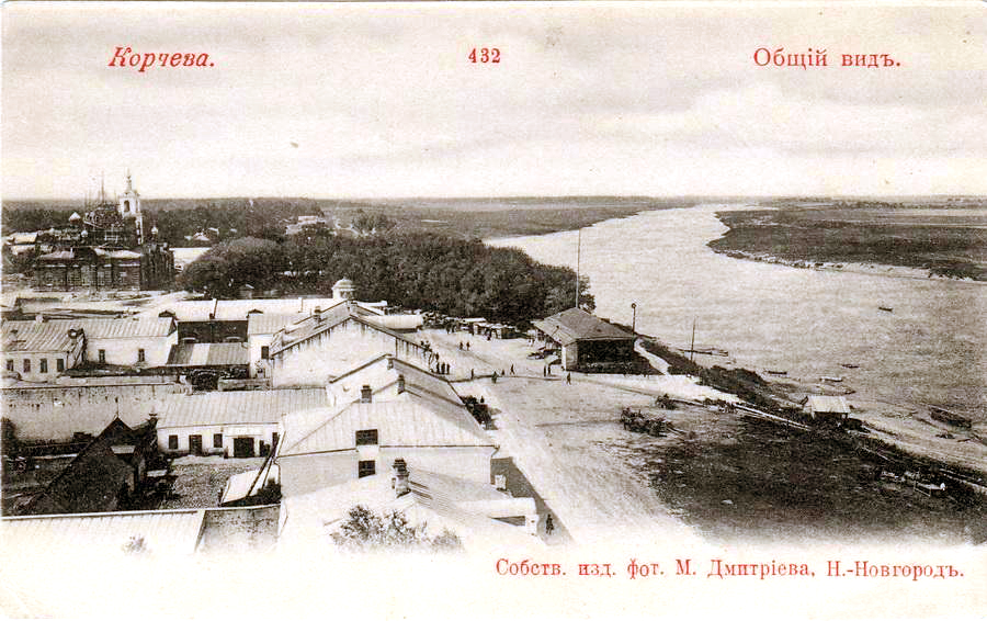 Почтовая карточка. Общий вид Корчевы